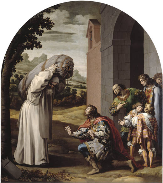 La humildad del conde Guillermo II d'Aquitaine.The Humility of Count William II of Neverstitle QS:P1476,es:"La humildad del conde Guillermo II d'Aquitaine." label QS:Les,"La humildad del conde Guillermo II d'Aquitaine."